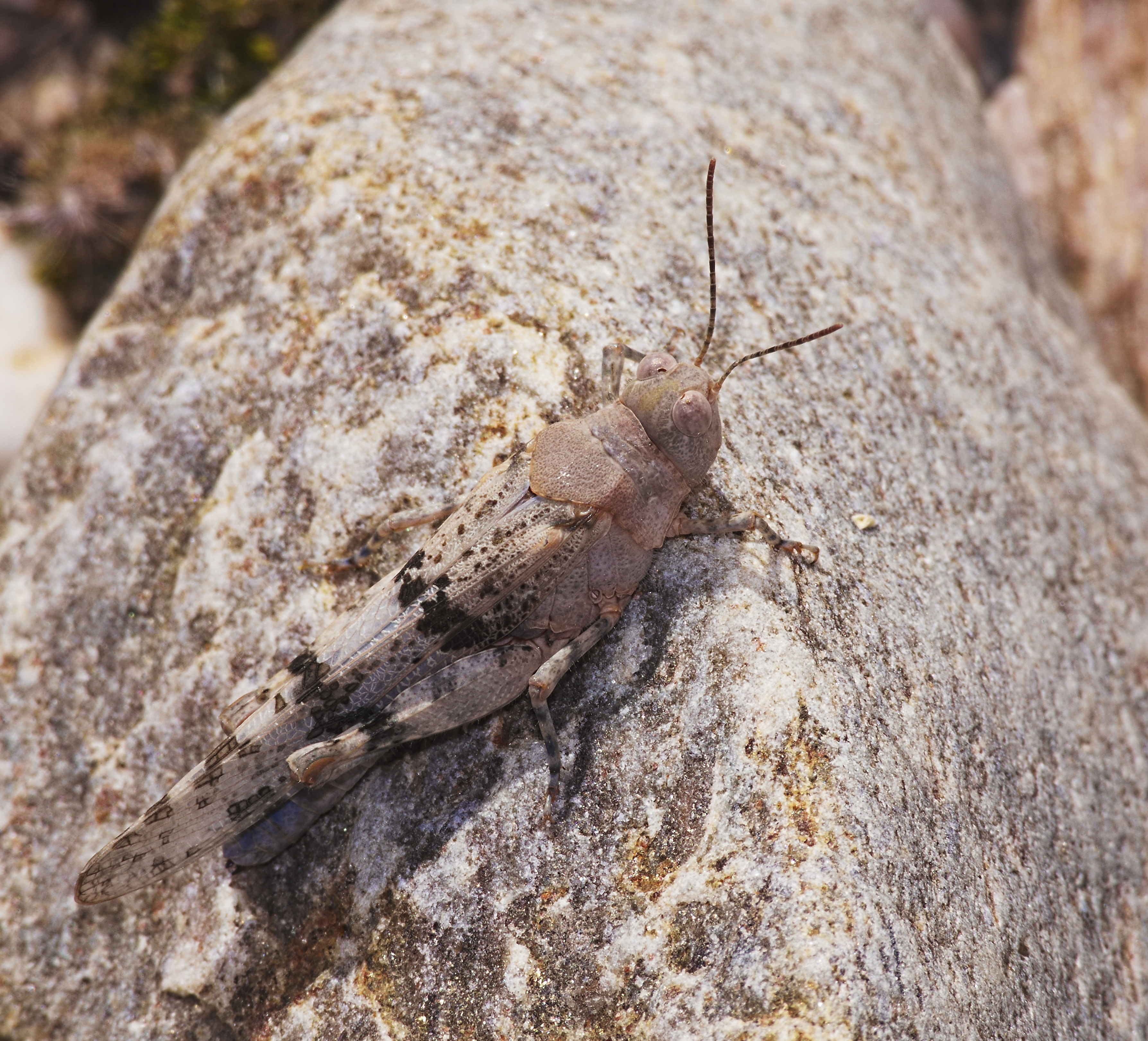 Blauflügelige Sandschrecke - Sphingonotus caerulans. Aufgenommen an der Mulde in Eilenburg, Sachsen, Deutschland.